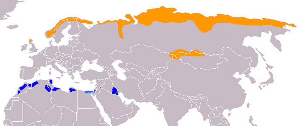 Self build by Ulrich Prokop (Scops 08:22, 22 October 2005 (UTC)) using photo filtre sources: maps by GROMS ( Beaman&Madge p. 307; Makatsch: Die Limikolen Europas einschließlich Nordafrikas und des Nahen Ostens. VEB Deutscher Landwirtschaftsverlag Berlin. 1986 Verbreitungsangaben im Handbuch der Vögel Mitteleuropas. Bd. 6/pp 286 ff